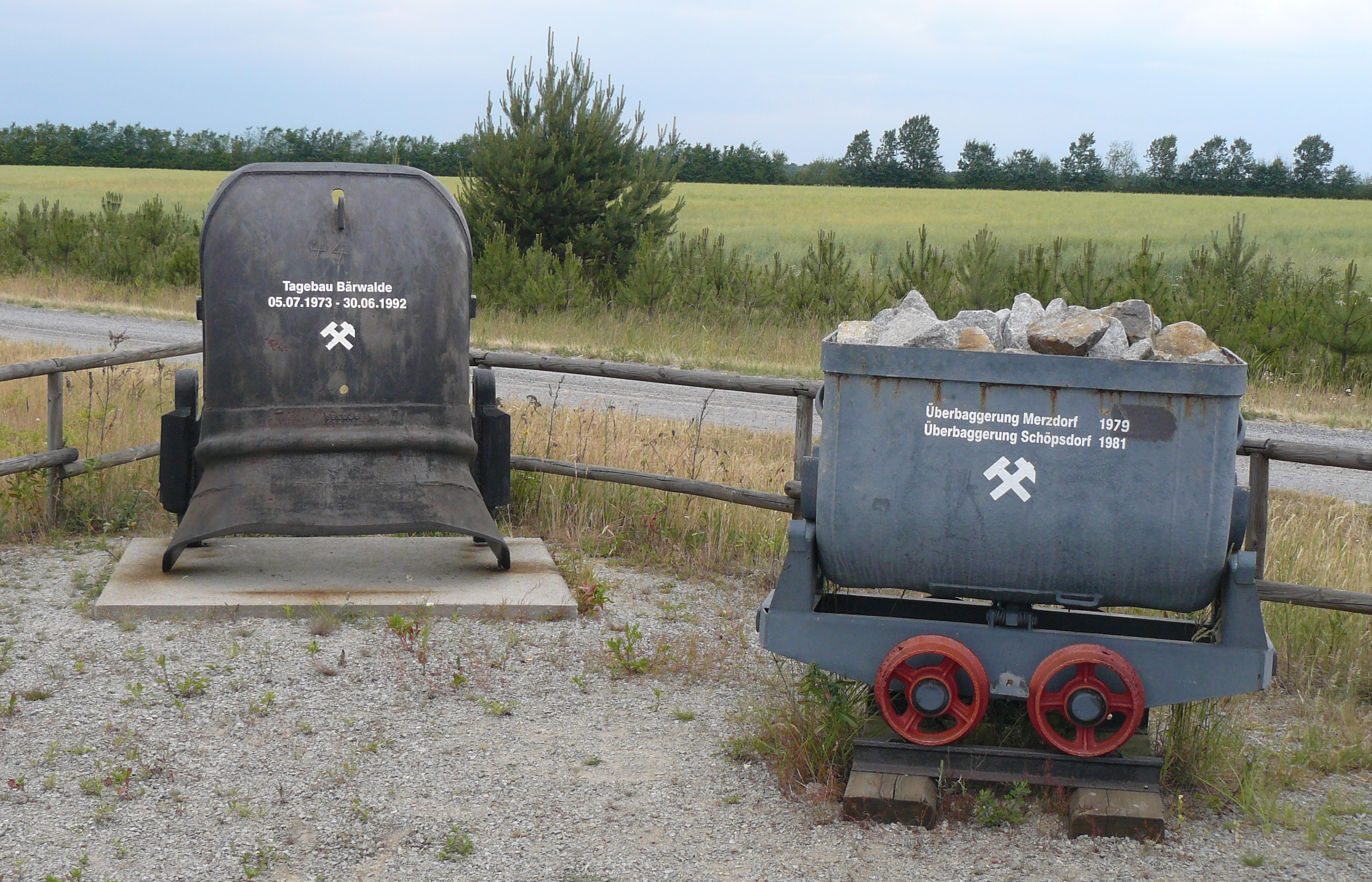 Tagebaugeräte an der Gedenkstätte für die abgebaggerten Dörfer Merzdorf und Schöpsdorf am Bärwalder See